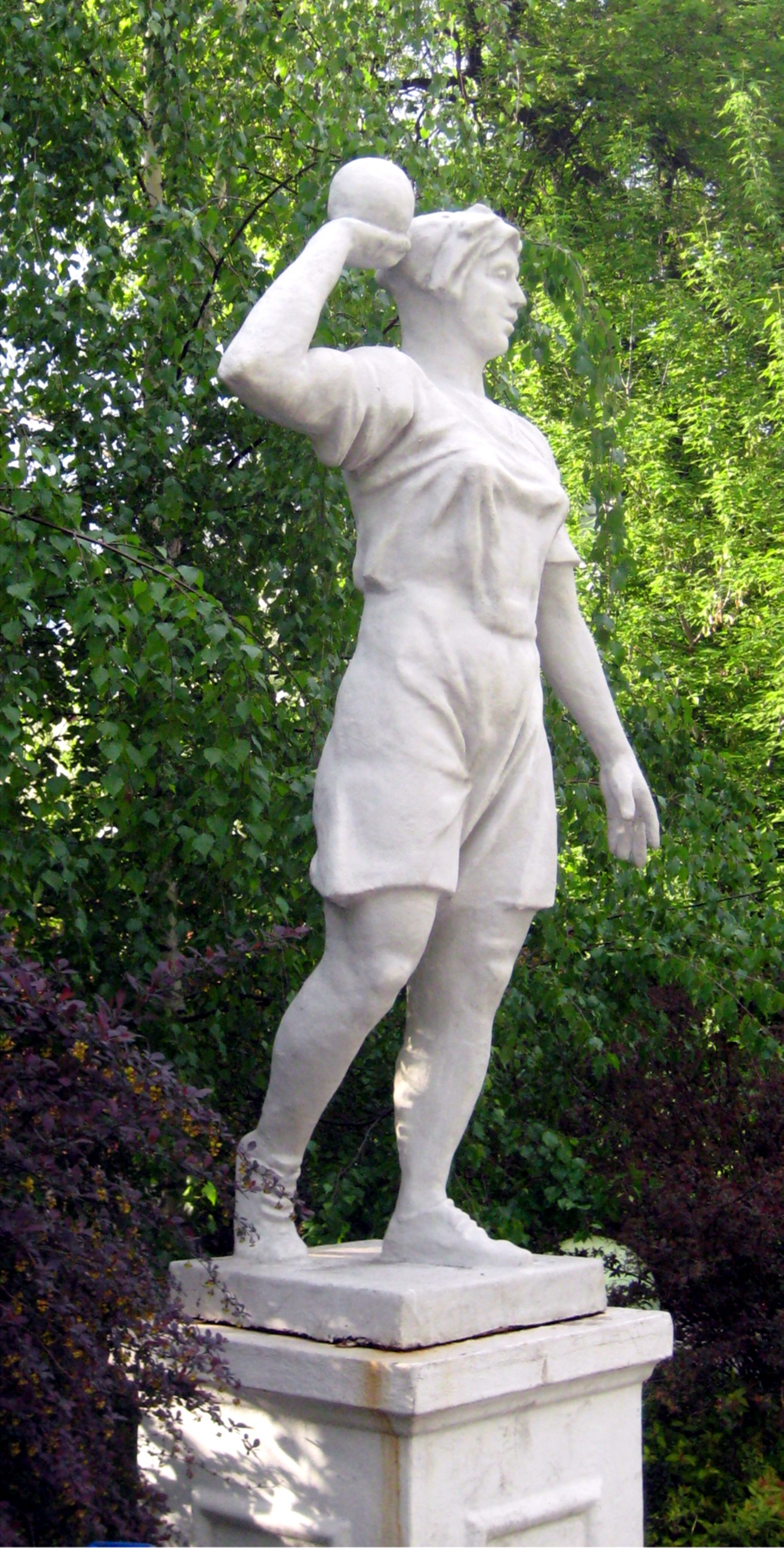 Метательница ядра. Парк Горького. Putting the shot, Gorky park